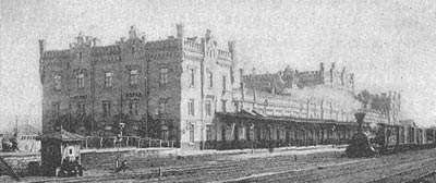 Київський залізничний вокзал. Кінець XIX століття